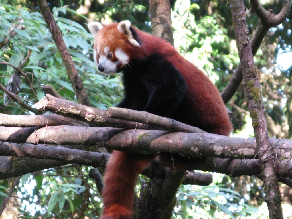 A Red Panda in Darjeeling.